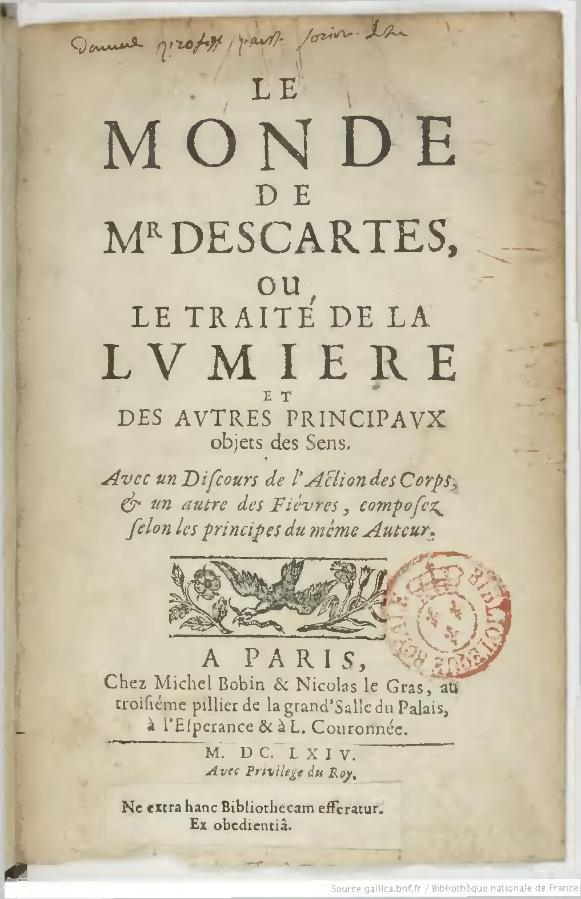 Imagen de la portada del libro Le Monde de Descartes